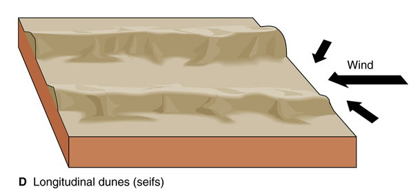 ภาพ 6 Longitudinal